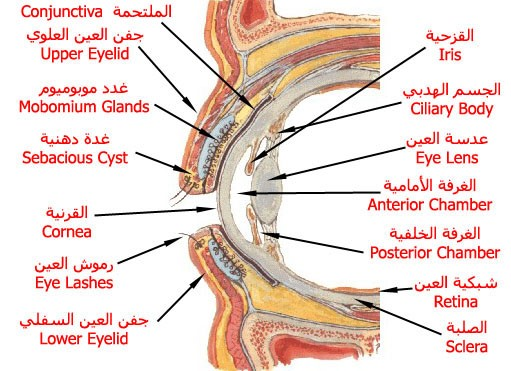 أجزاء قرنية العين